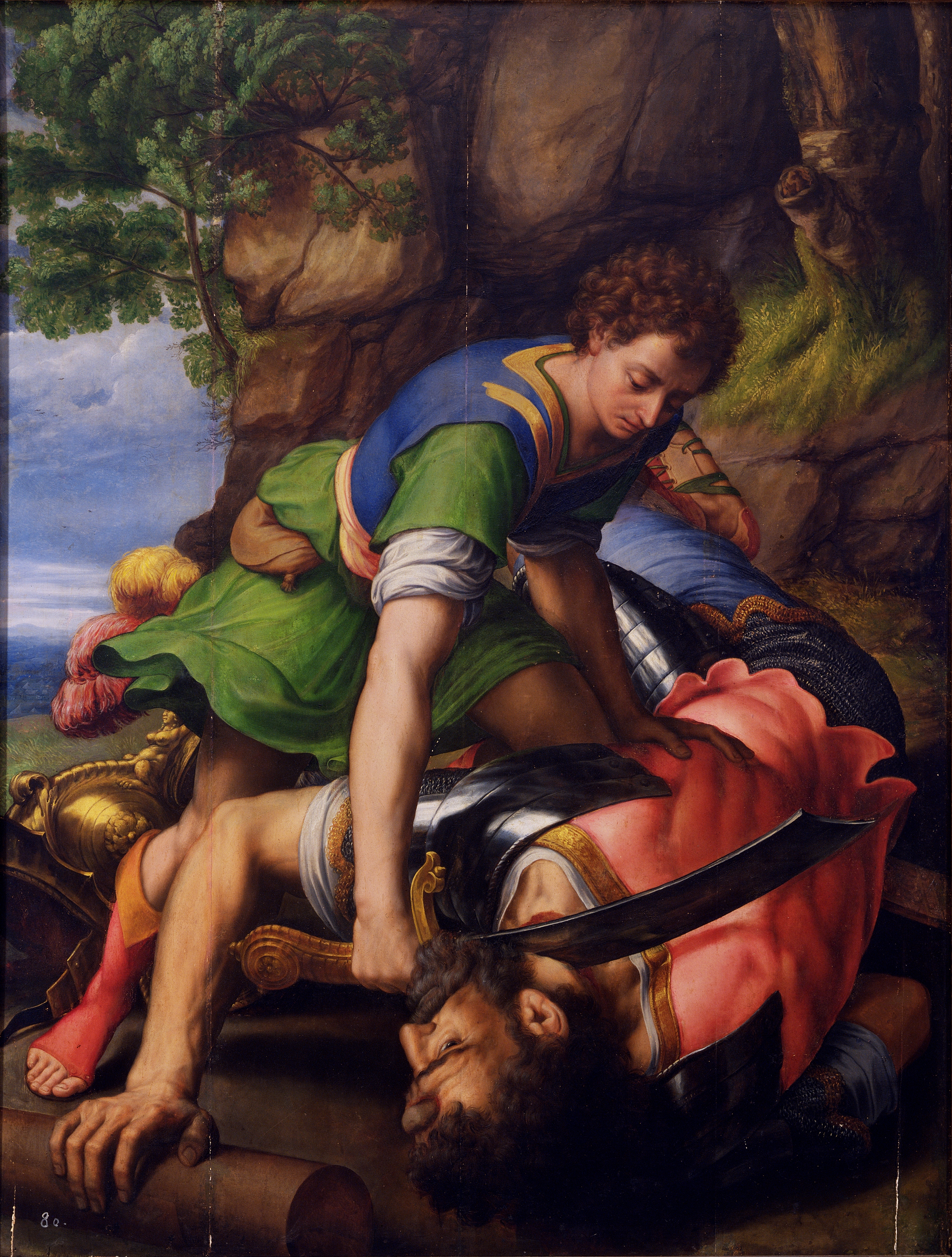 El lienzo representa el momento en que David, futuro rey de Israel y succesor de Saúl, decapita al gigante filisteo Goliat tras haberle matado con una piedra lanzada con una honda.